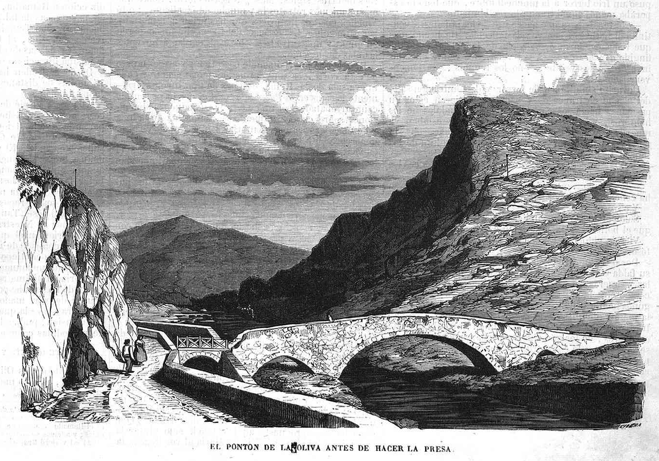 El Pontón de la Oliva antes de hacer la presa, en la revista española El Museo Universal.